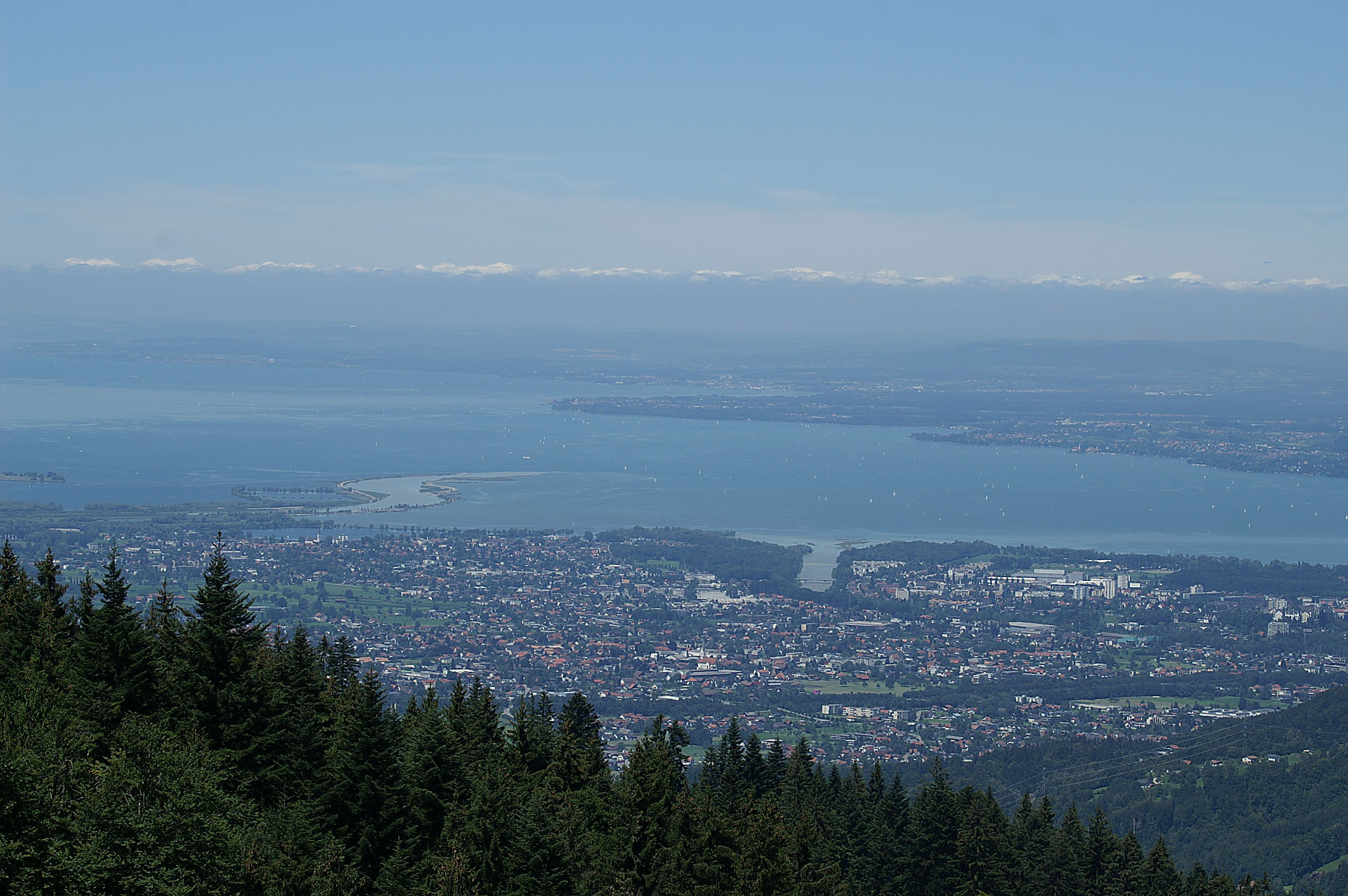 Hard zwischen Rhein- und Bregenzer Ache -Mündung